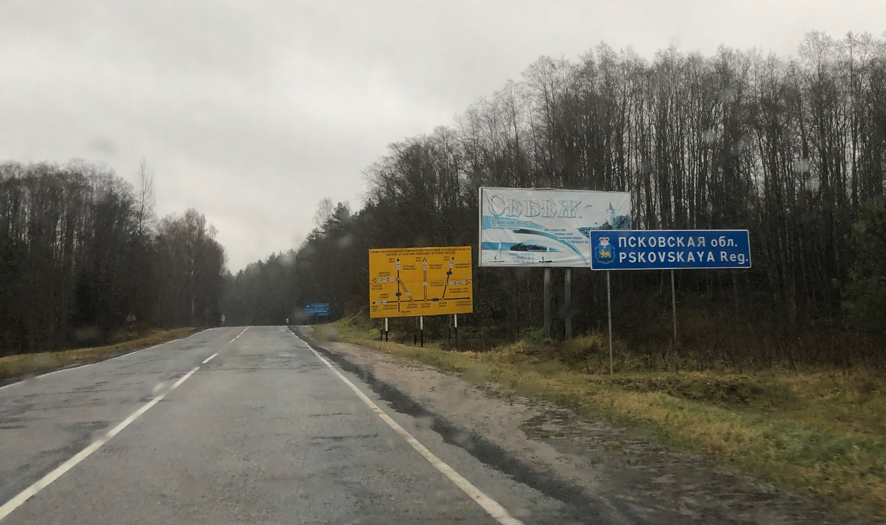 Граница с Беларусью